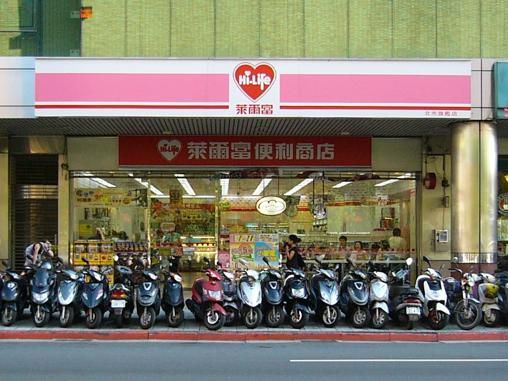 萊爾富便利商店北市旗艦店，位於臺北市松山區八德路三段32號1樓（敦北長城大樓），2013年1月2日歇業。